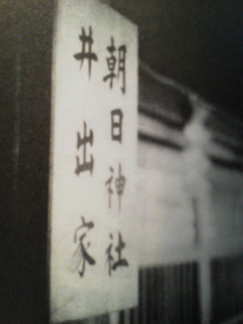 朝日神社井出家表札